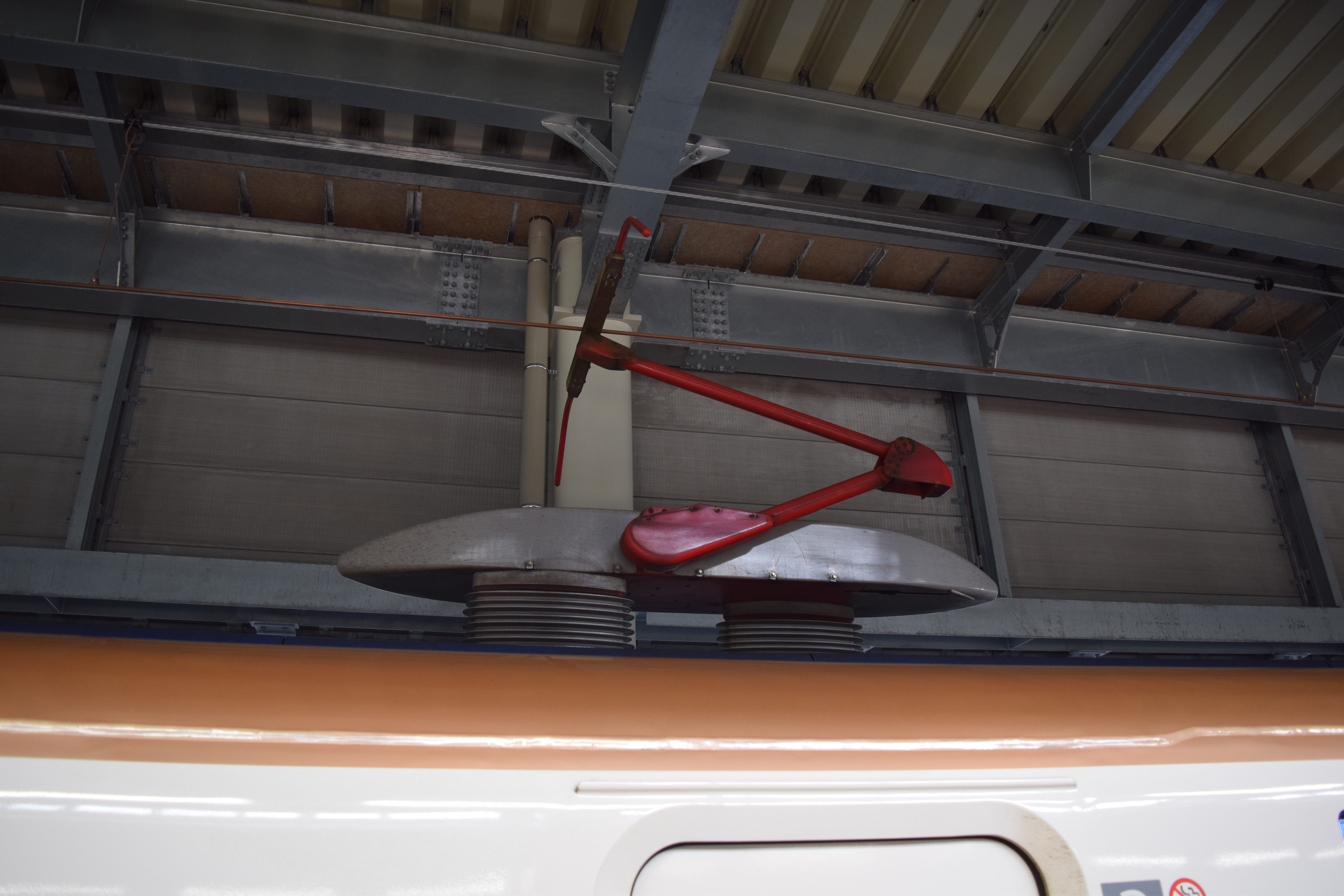 E7系電車に搭載されているPS208A型パンタグラフ（金沢駅ホームで撮影）